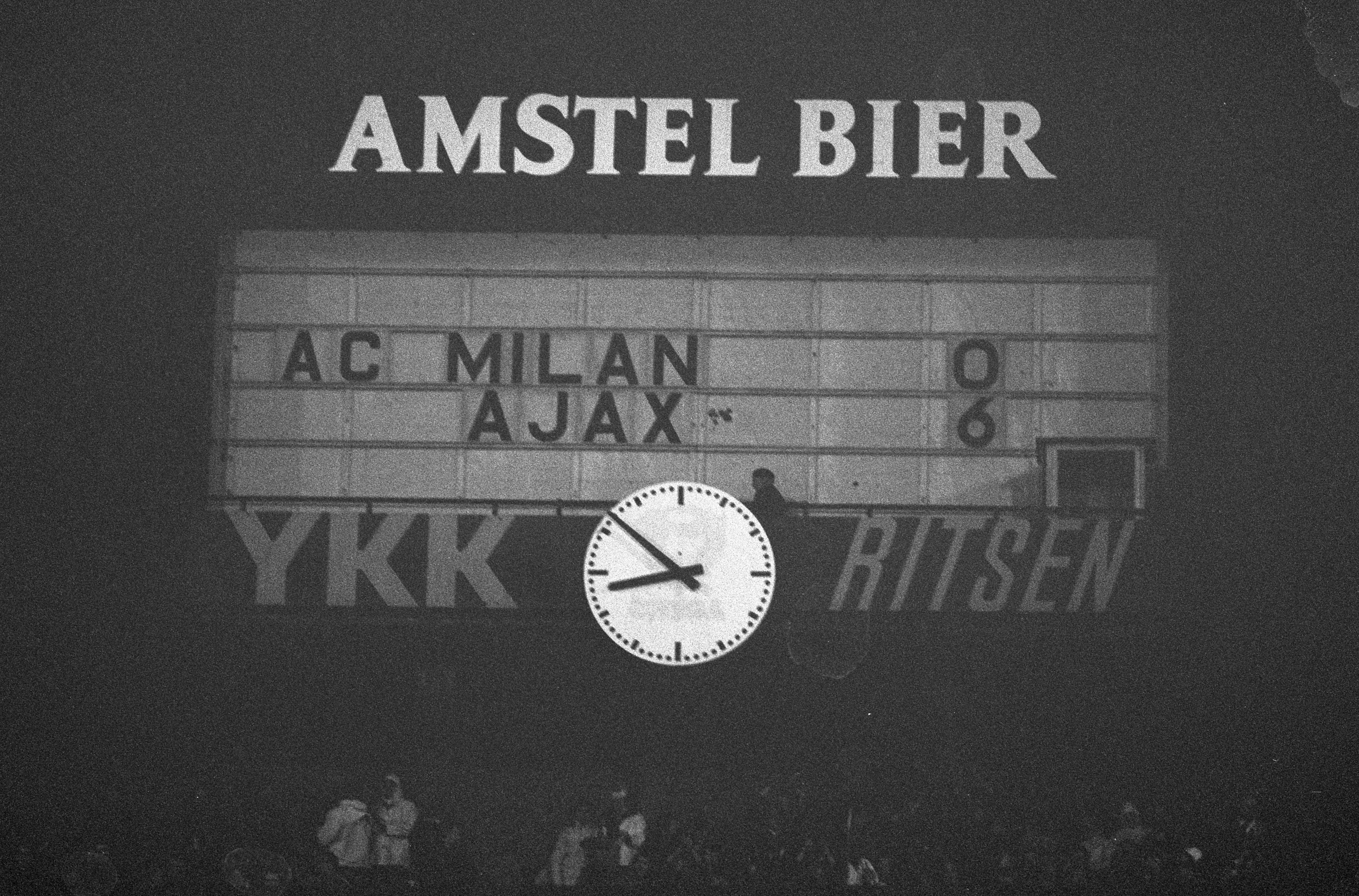 Collectie / Archief : Fotocollectie Anefo Reportage / Serie : Ajax tegen AC Milaan in het kader van de Super Europa Cup: 6-0 Beschrijving : Scorebord met de eindstand Datum : 16 januari 1974 Locatie : Amsterdam, Noord-Holland Trefwoorden : sport, voetbal Persoonsnaam : Cup Instellingsnaam : AC Milaan, Europacup Fotograaf : Fotograaf Onbekend / Anefo Auteursrechthebbende : Nationaal Archief Materiaalsoort : Negatief (zwart/wit) Nummer archiefinventaris : bekijk toegang 2.24.01.05 Bestanddeelnummer : 926-9474